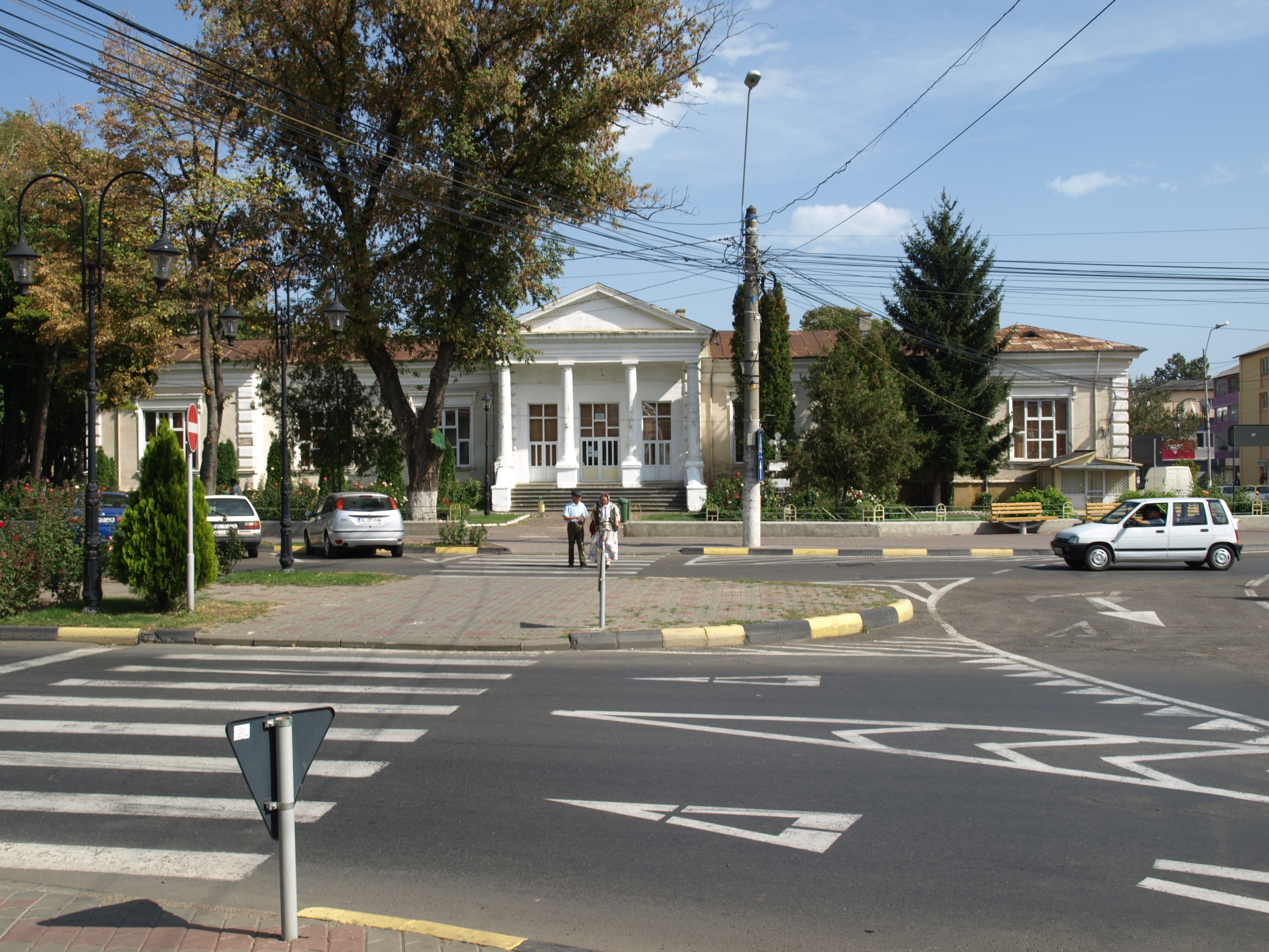 Fostul Tribunal Județean Tecuci